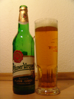 Pilsner Urquell, dans un verre non homologué. Auteur : Régis Lachaume.